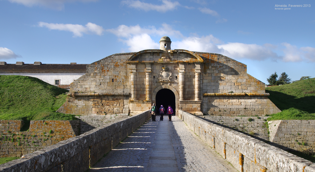 Porta da Fortificação Almeida